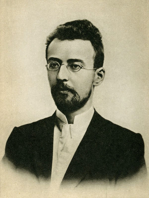 Mieczysław Karłowicz, fot. Łaski Diffusion/East News